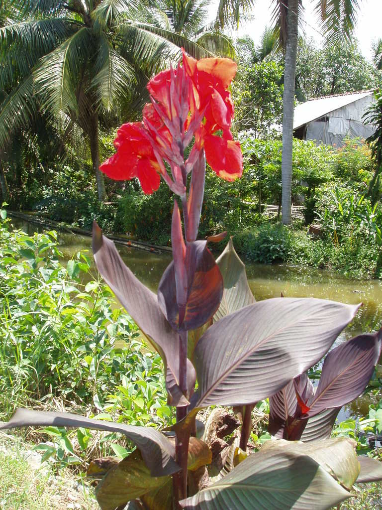 Chuối hoa lai, danh pháp khoa học: Canna generalis Hình do tôi chụp